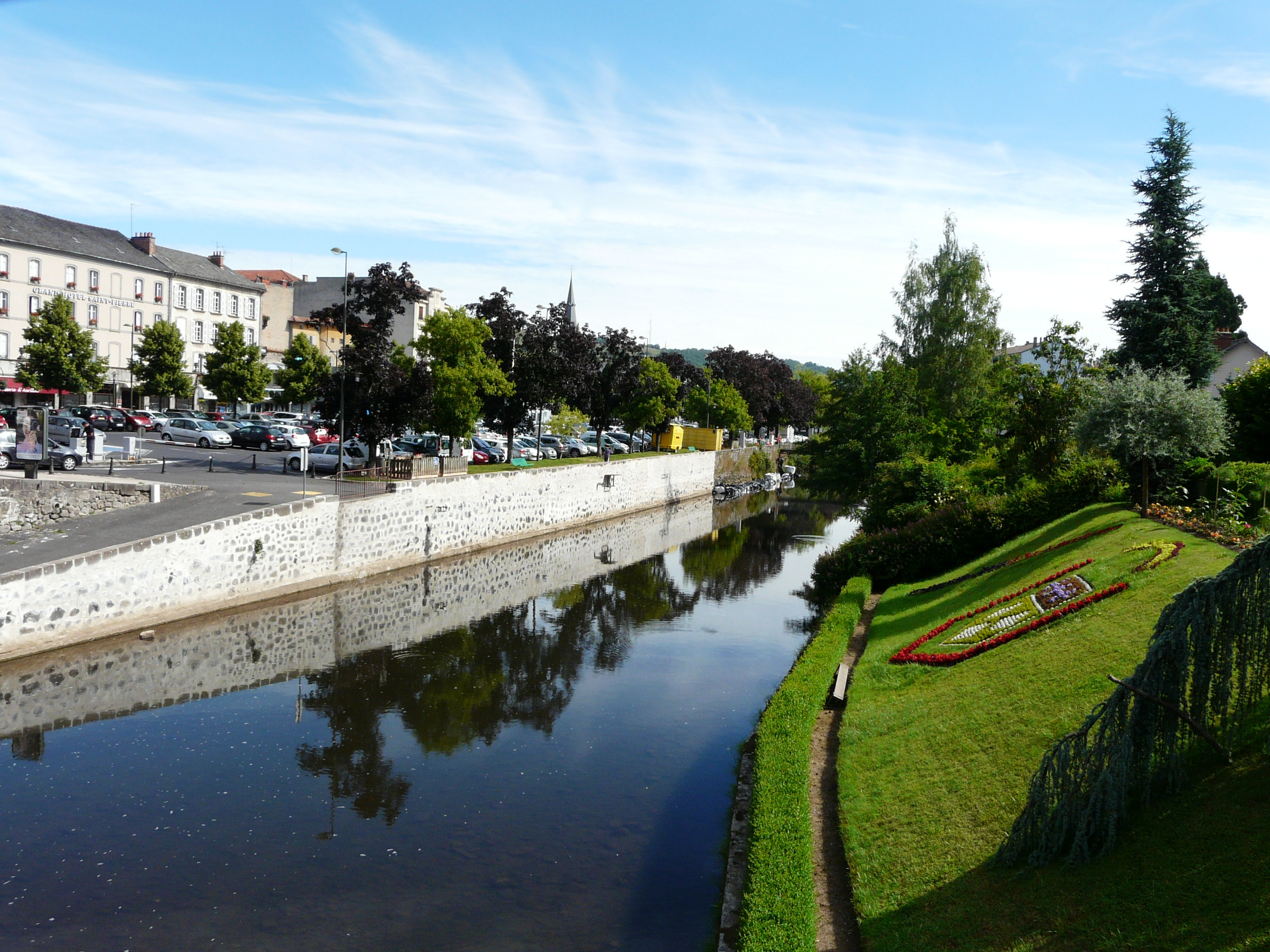 La Jordanne à Aurillac, Cantal, France.